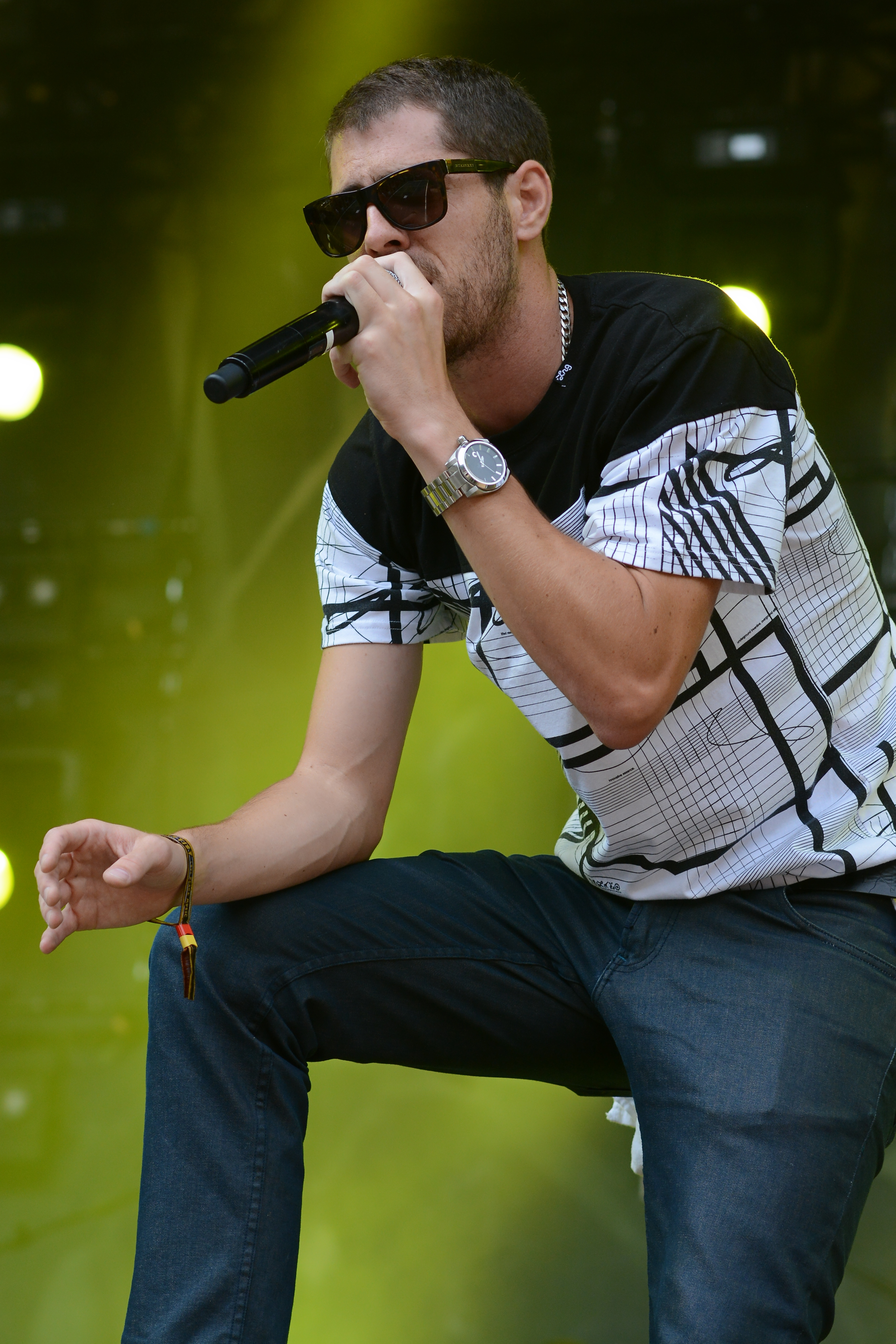 Richie Campbell / 911 Band beim Ruhr Reggae Summer in Mülheim